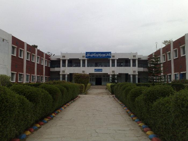 Edifici del poble de Mandeer (Gujrat) Mandeer city building